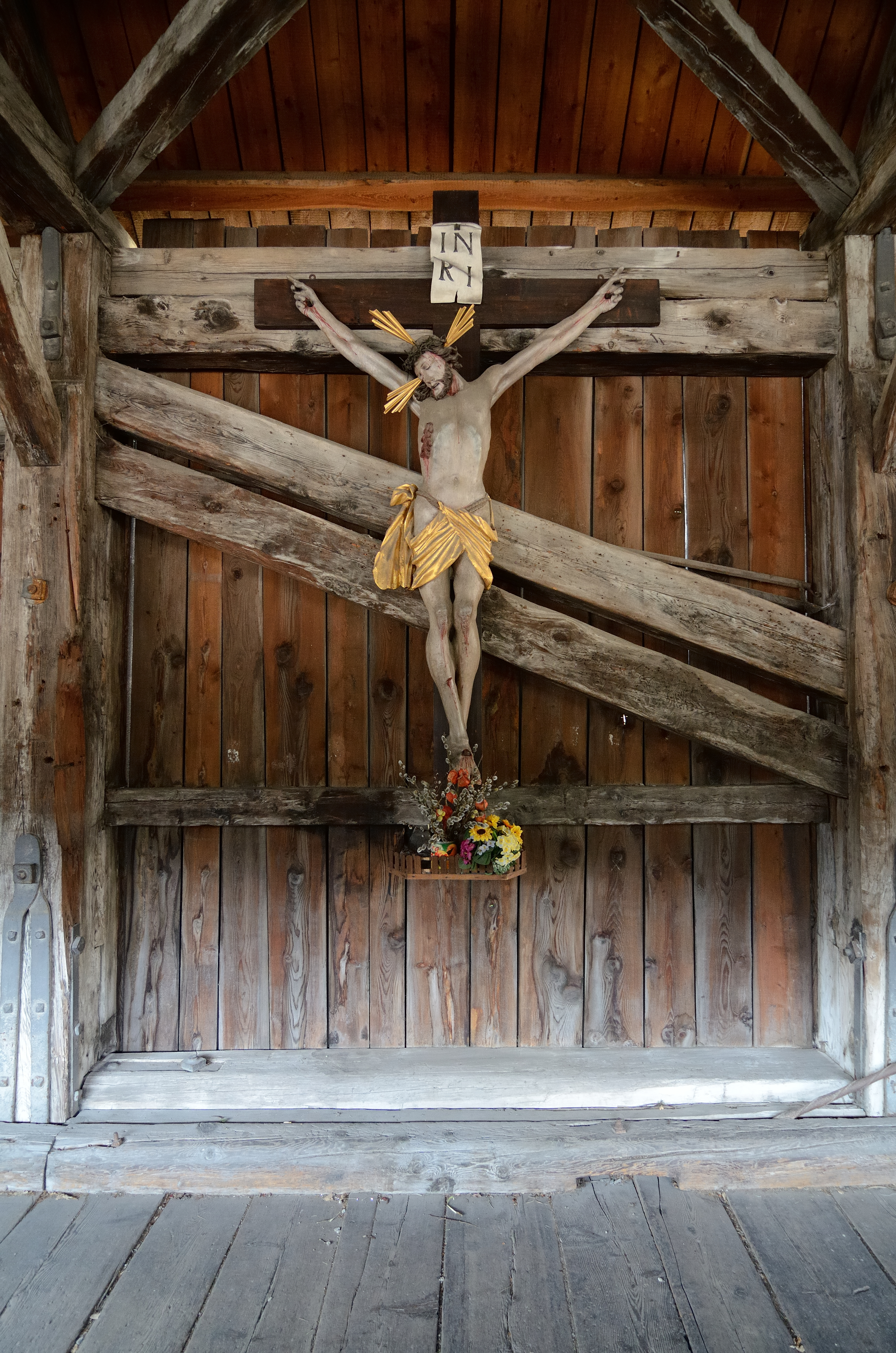 Kreuz in der Straßenbrücke Punbrugge